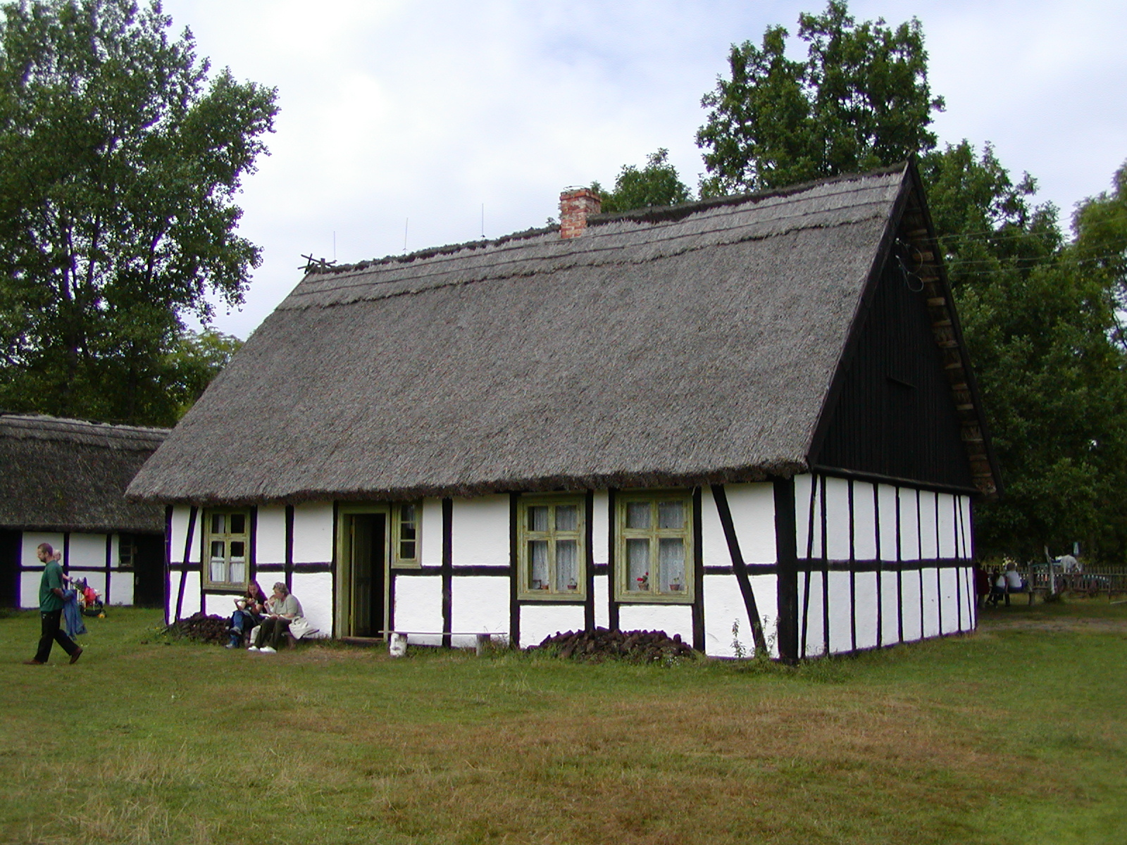 Kluki, Poland Muzeum Wsi Słowińskiej, zagroda Alberta Klücka, Kluki Żeleskie, 1923 rok